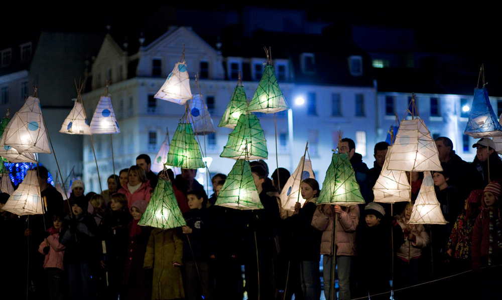 Lantern Parade at La Fête dé Noué, in Saint Helier, Jersey.